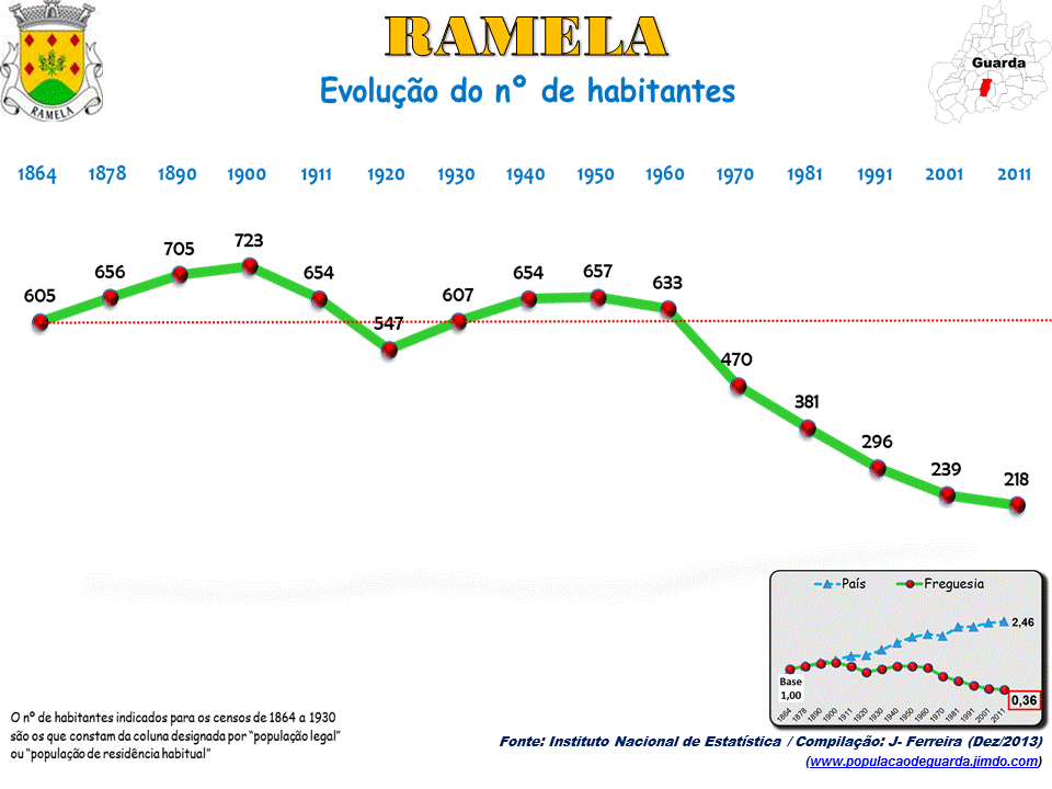 Evolução da População 1864 / 2011